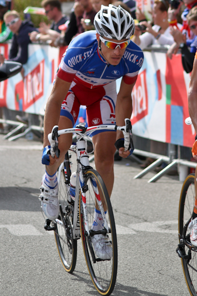 Sylvain Chavanel